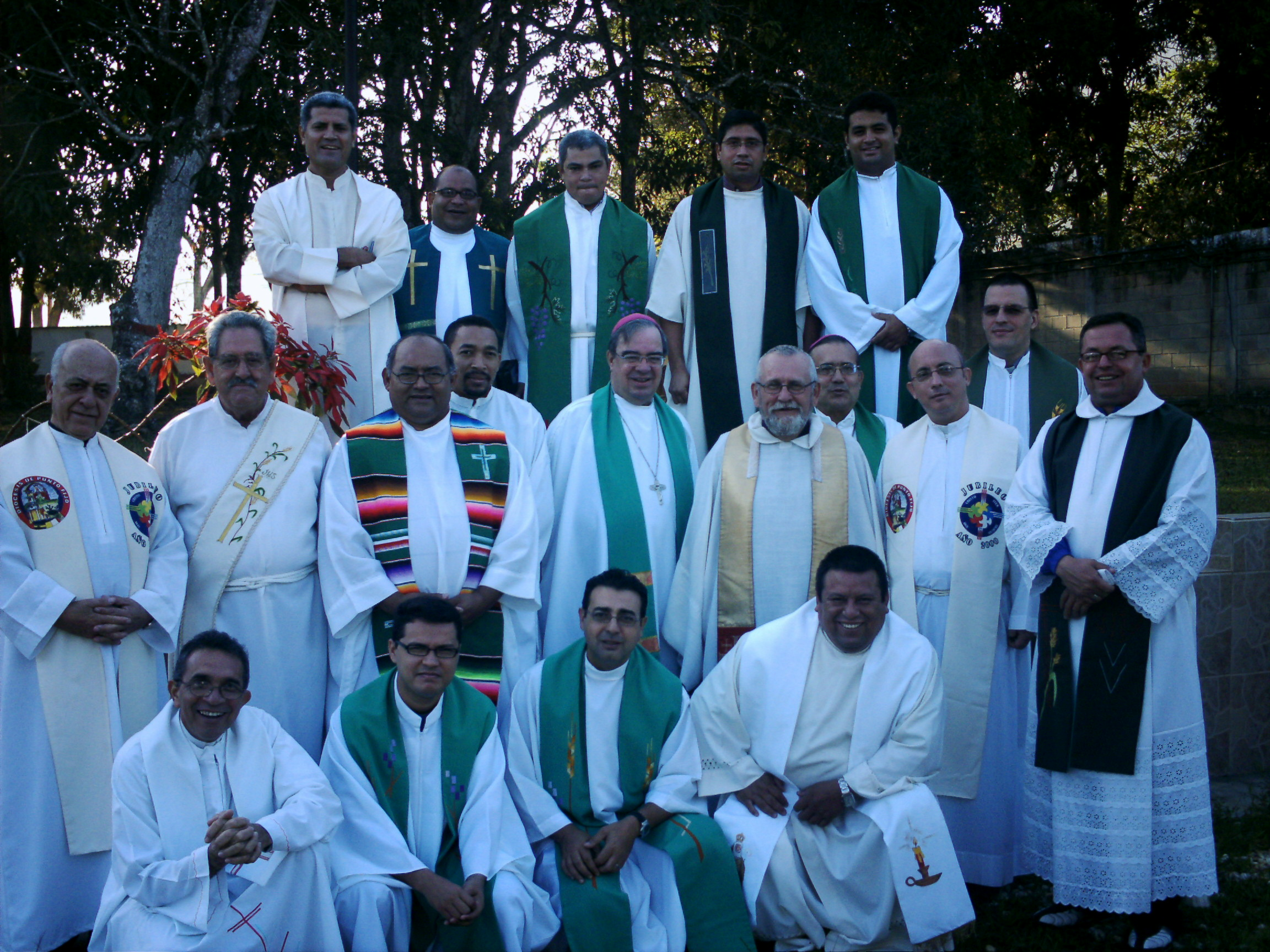 Exelentisimo Sr. Obispo de Diócesis de Punto Fijo junto a Diáconos y Sacerdotes